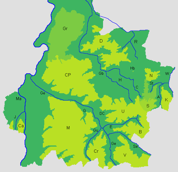 Kaart met plateaus en dalen van Zuid-Limburg, NederlandLegenda: B Plateau van Bocholtz Ca Plateau van Caestert CP Centraal Plateau Cr Plateau van Crapoel D Plateau van Doenrade Gr Plateau van Graetheide Hb Heksenberg K Plateau van Kerkrade M Plateau van Margraten N Plateau van Nieuwenhagen S Plateau van Spekholzerheide U Plateau van Ubachsberg V Plateau van Vijlen A Anstelerbeek C Caumerbeek DC Droogdal van Colmont E Eyserbeek G Gerendal Gb Geleenbeek Ge Geul Gu Gulp H Bekken van Heerlen J Jeker Ma Maas R Bekken van de Roode Beek Se Selzerbeek St Strijthagerbeek W Worm